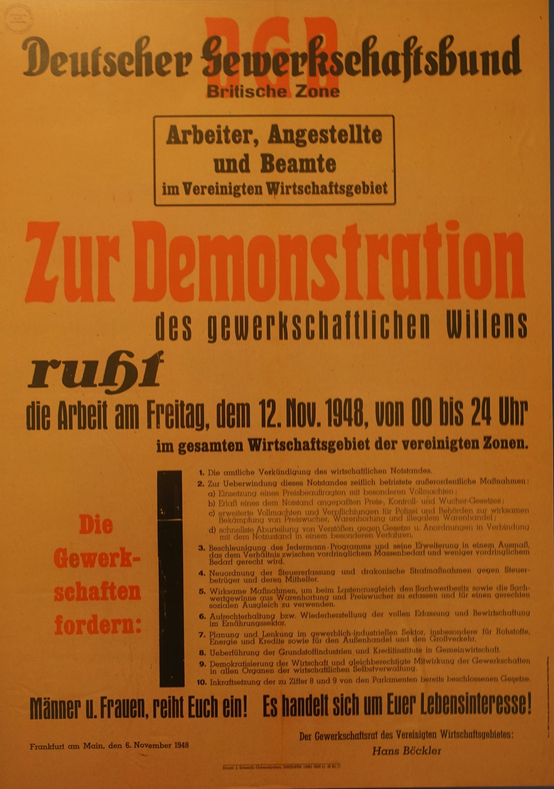 Plakat des DGB zum 24stündigen Streik vom 12.11.1948 in der Bi-Zone